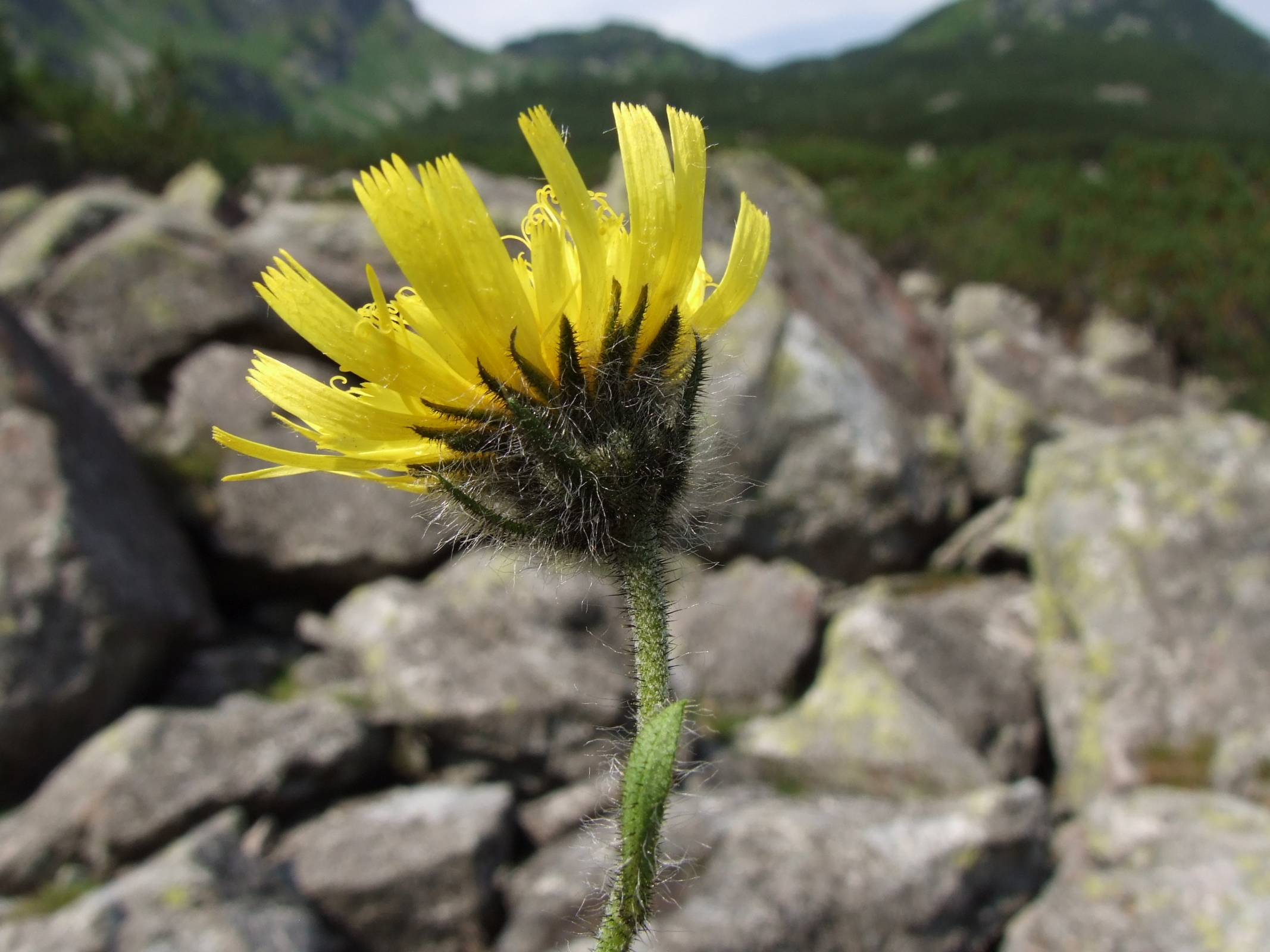 Hieracium alpinum (pl. jastrzębiec alpejski), habitat: West Tatra Mountains, Smutna Przełęcz